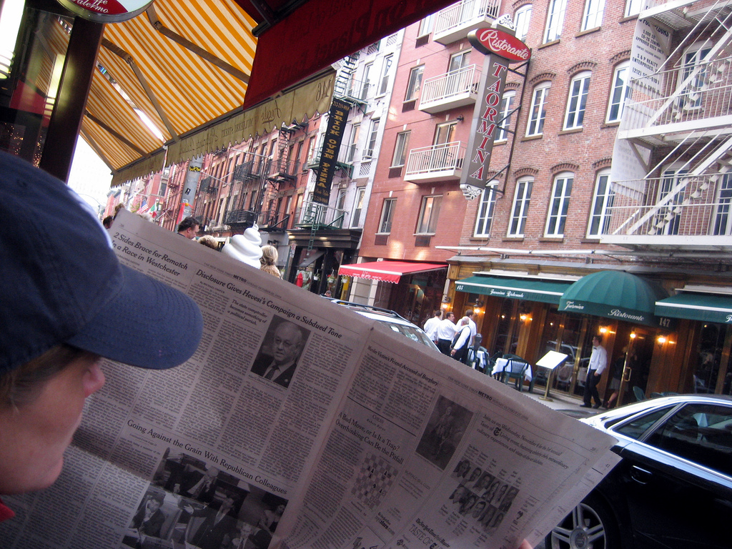 NYC